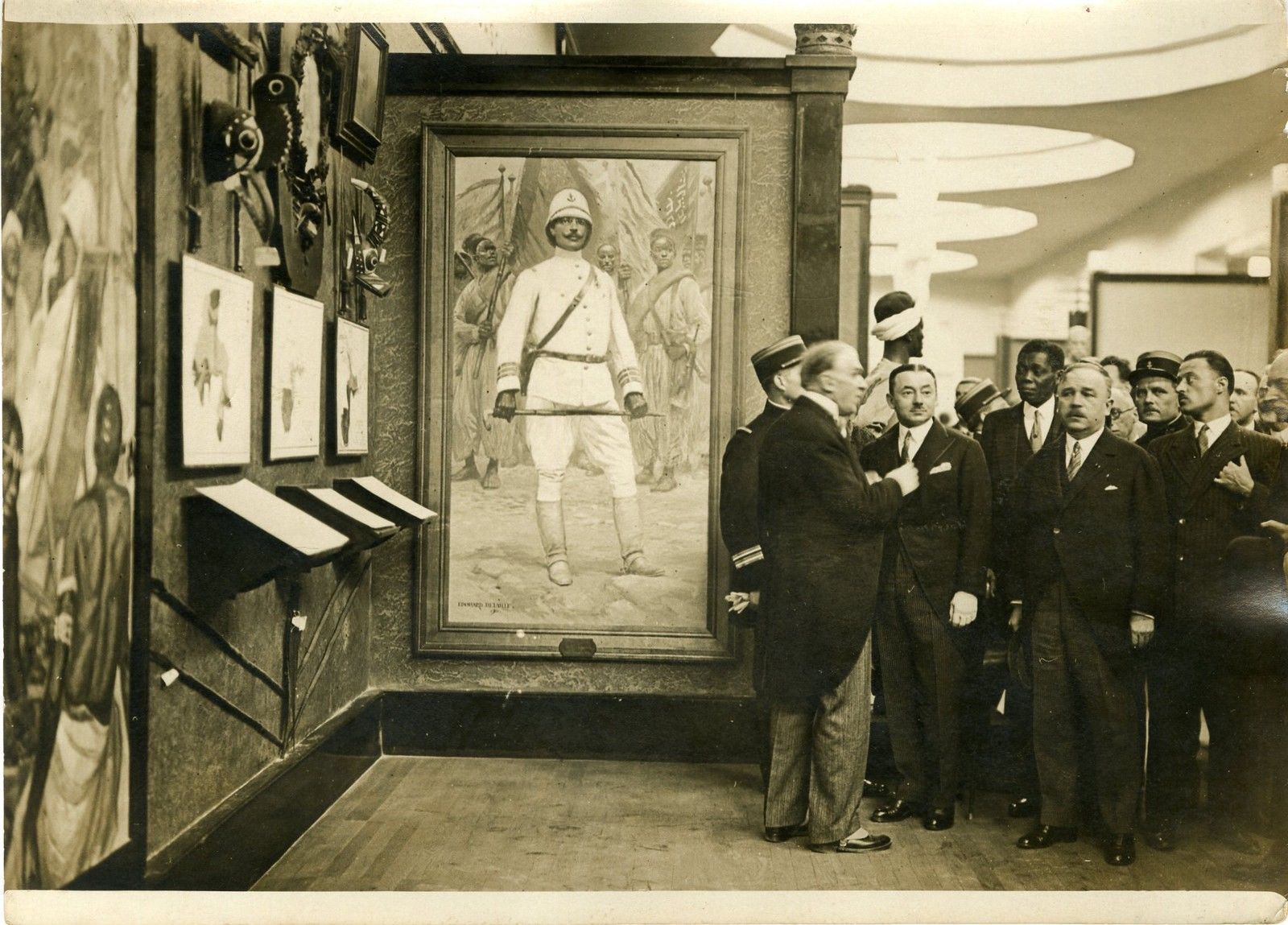 Inauguration du Musée permanent des colonies le 16 mai 1931, dans le cadre de l'Exposition coloniale internationale de Paris. À gauche, Victor Beauregard souhaite la bienvenue à Paul Reynaud, ministre des colonies et à Marcel Olivier, ancien gouverneur général de Madagascar et co-organisateur de l'Exposition avec le Maréchal Hubert Lyautey.